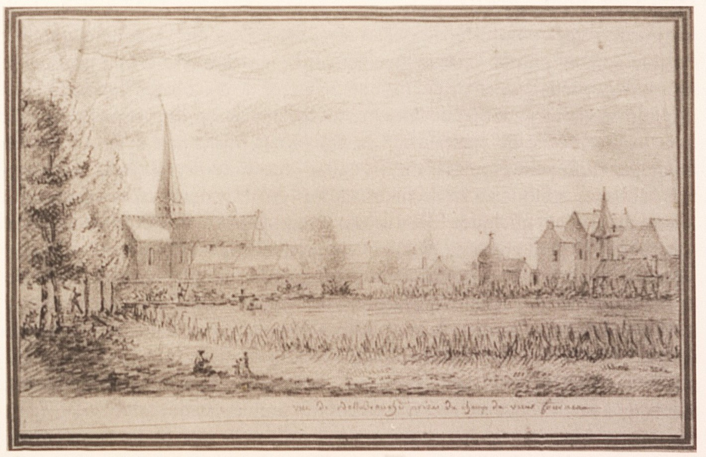 Abbaye de Bellebranche vue au XVIIIe siècle.